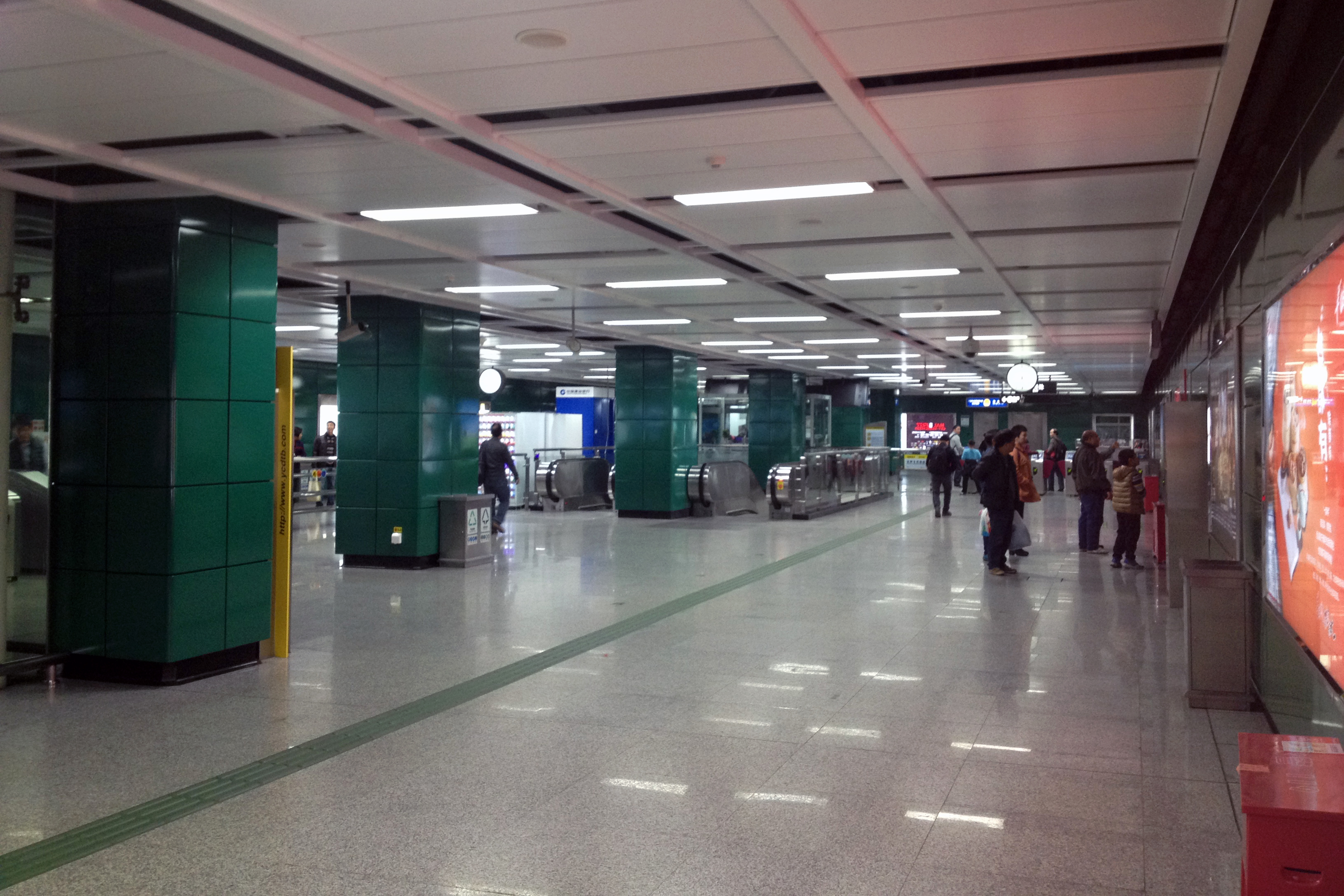 广州地铁宝岗大道站站厅